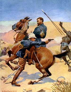 gravure du XIXème siècle représentant le sauvetage d'un officier par le lieutenant-colonel Redver Buller à Hlobane, 1879.